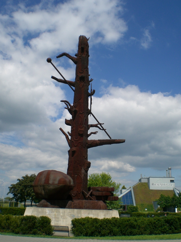 Stahlgussplastik „Elbquelle“ in Riesa von Jörg Immendorff